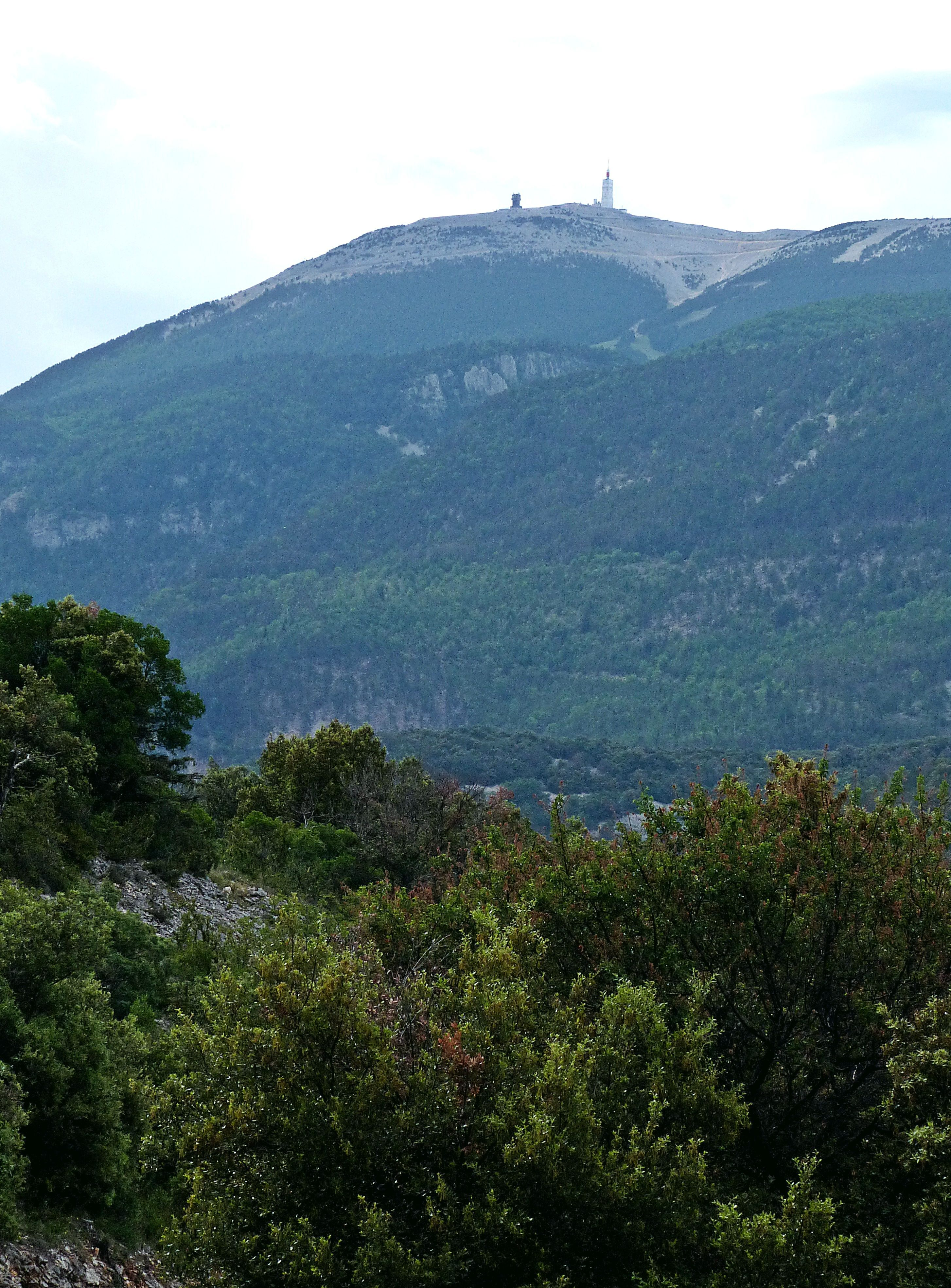 Le Toulourenc: Blick zum Mont Ventoux